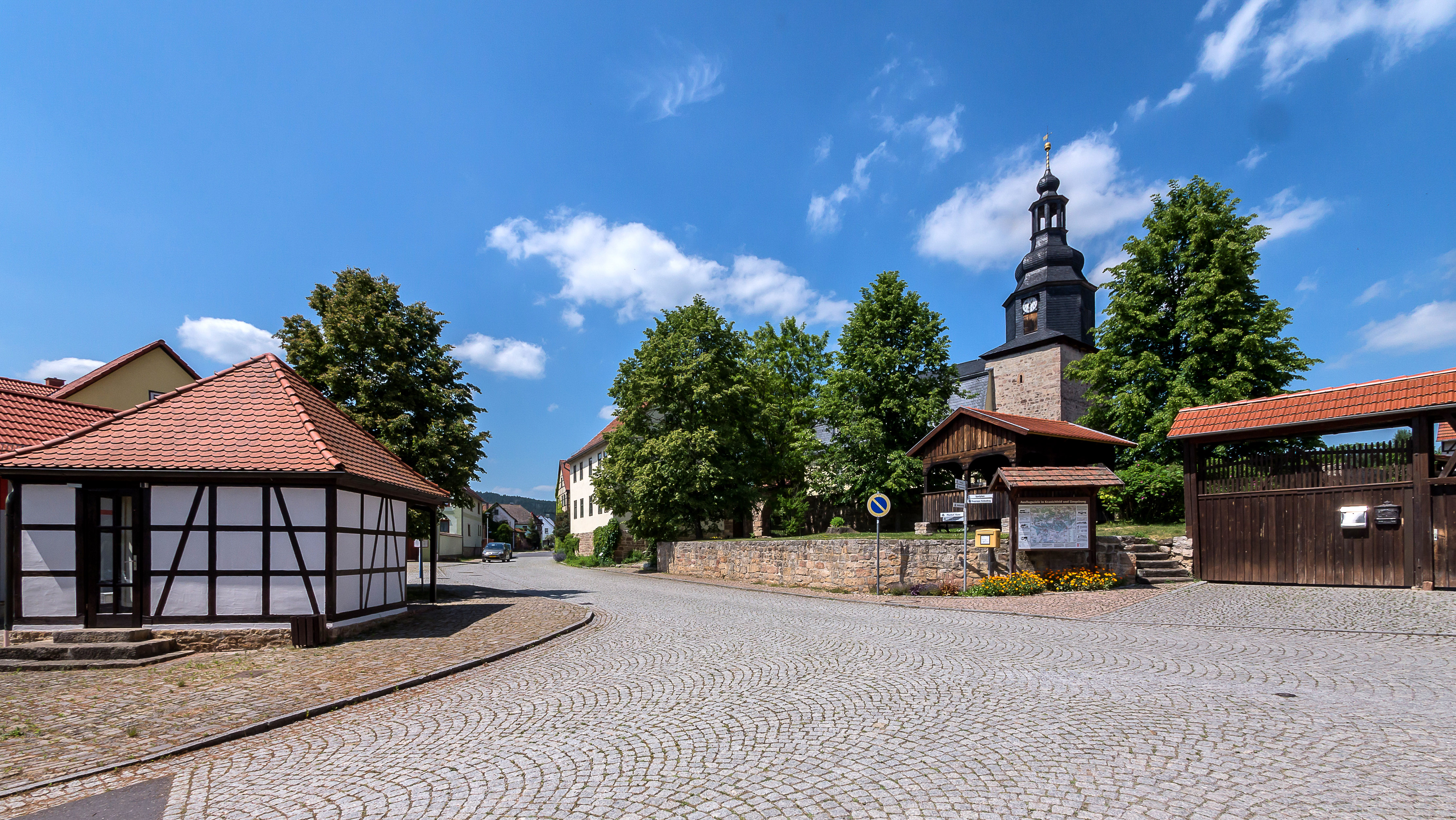 Hohenfelden Ortslage